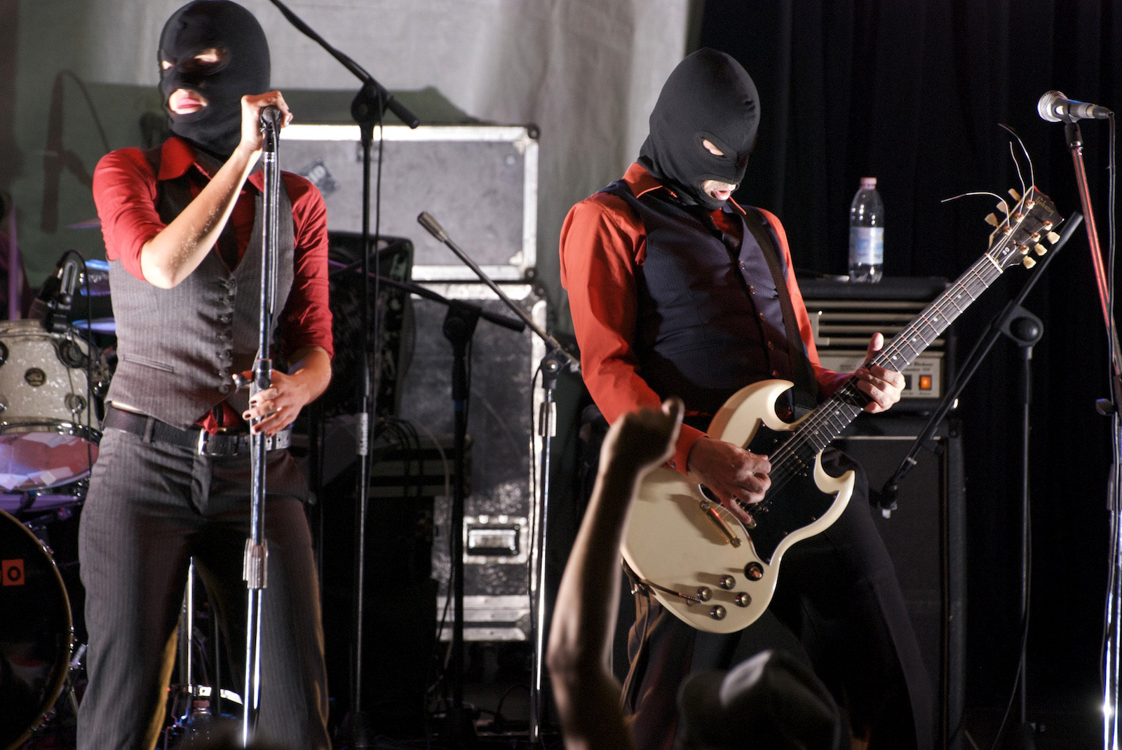 Sick Tamburo in concerto. A sinistra, Elisabetta Imelio, a destra Gianmaria Accusani